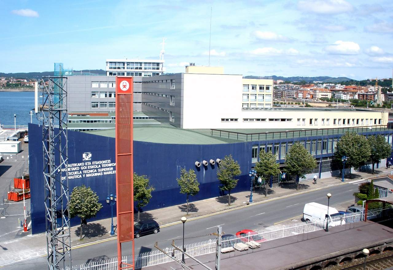 Escuela Técnica Superior de Náutica y Máquinas Navales (UPV-EHU), en Santurce, Vizcaya